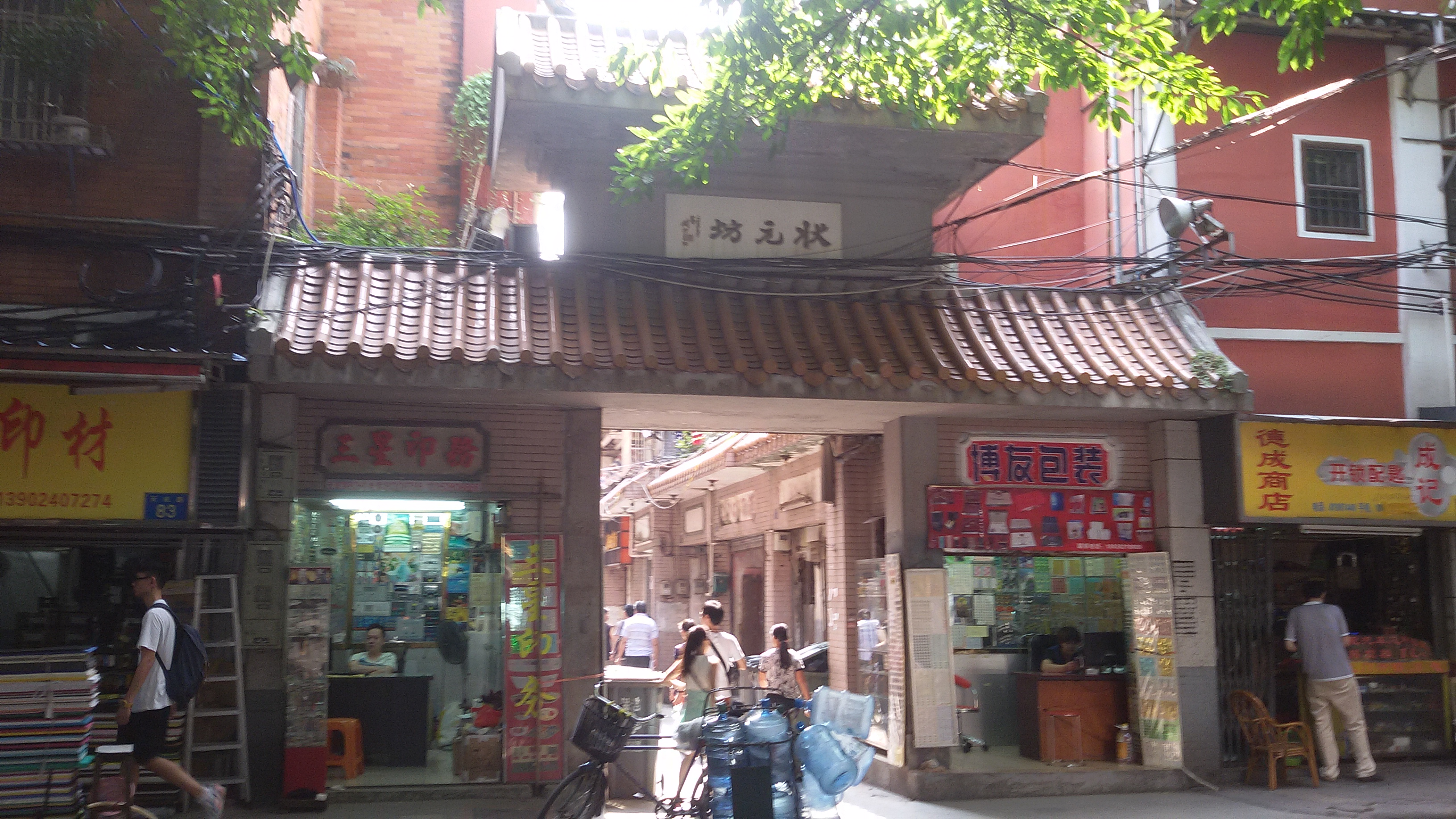 粵語: 狀元坊嘅東牌坊